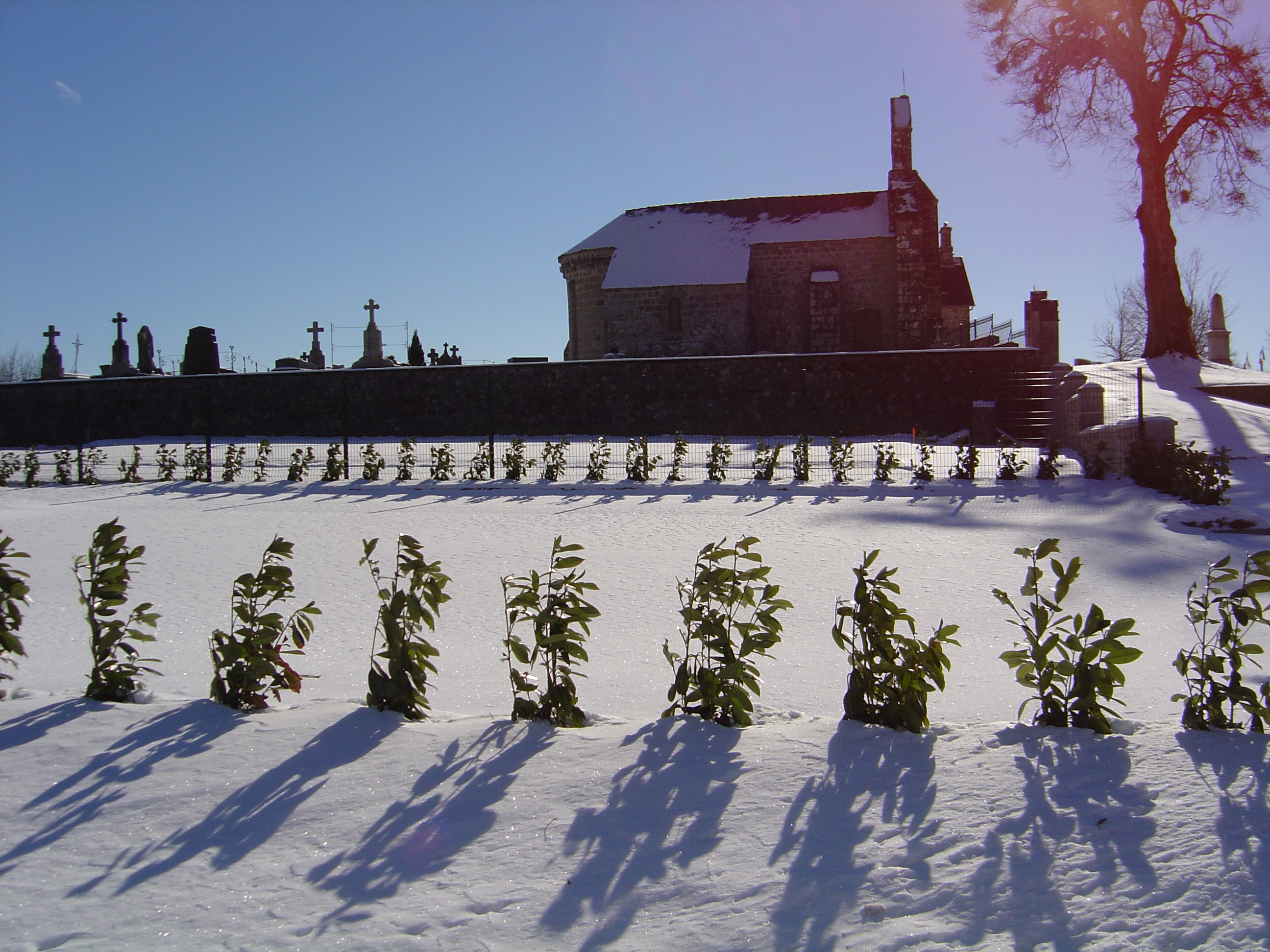 Église de Saint-Étienne-la-Geneste